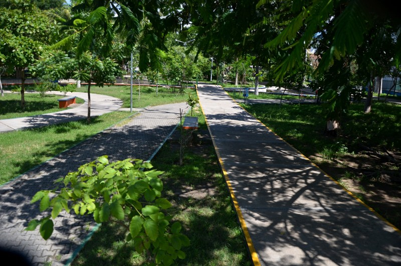 Parque Florestal Fernando Silvestre da Silva em Santa Cruz do Capibaribe